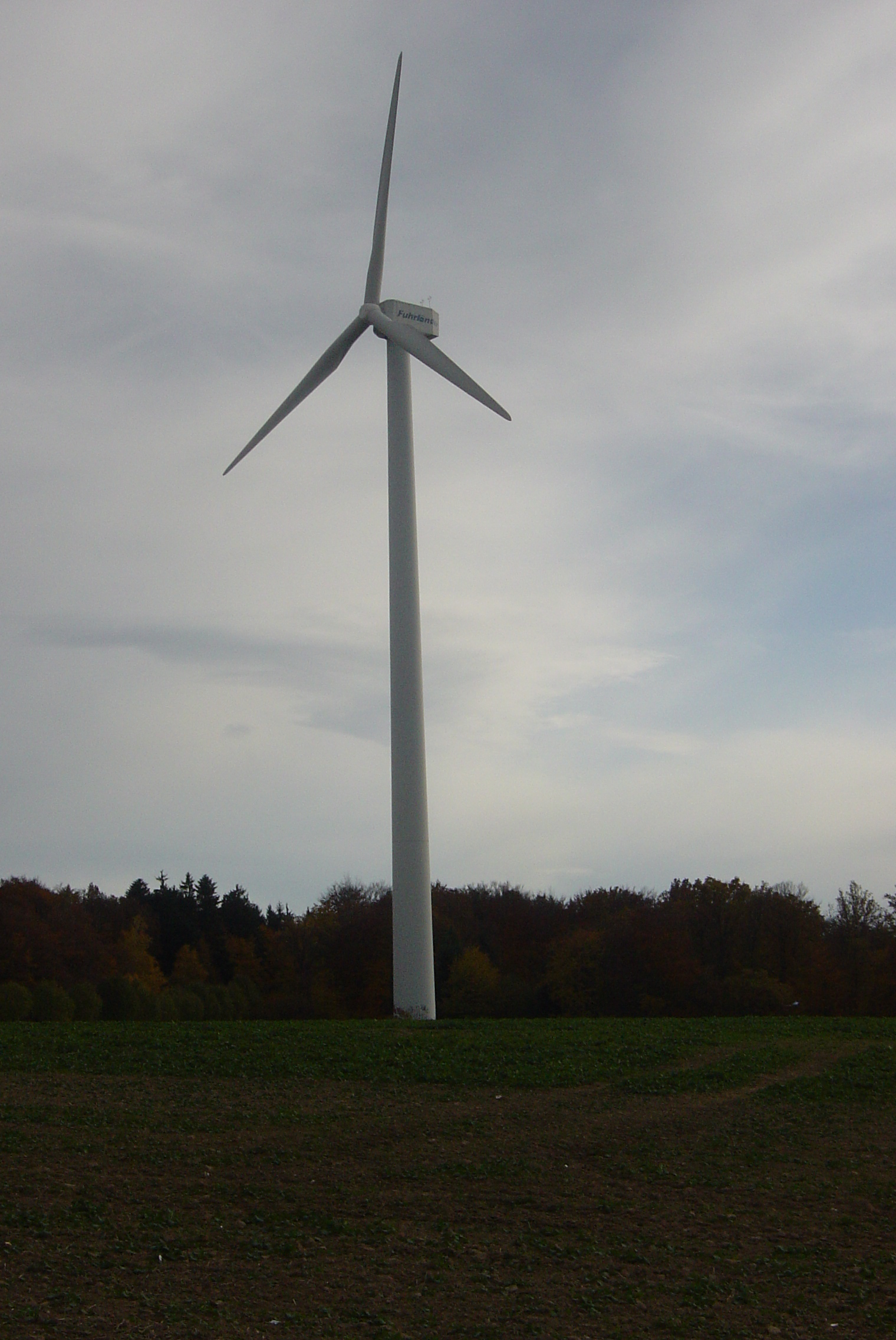 Fuhrländer Fl 1000 Windkraftanlage mit 70 m Nabenhöhe